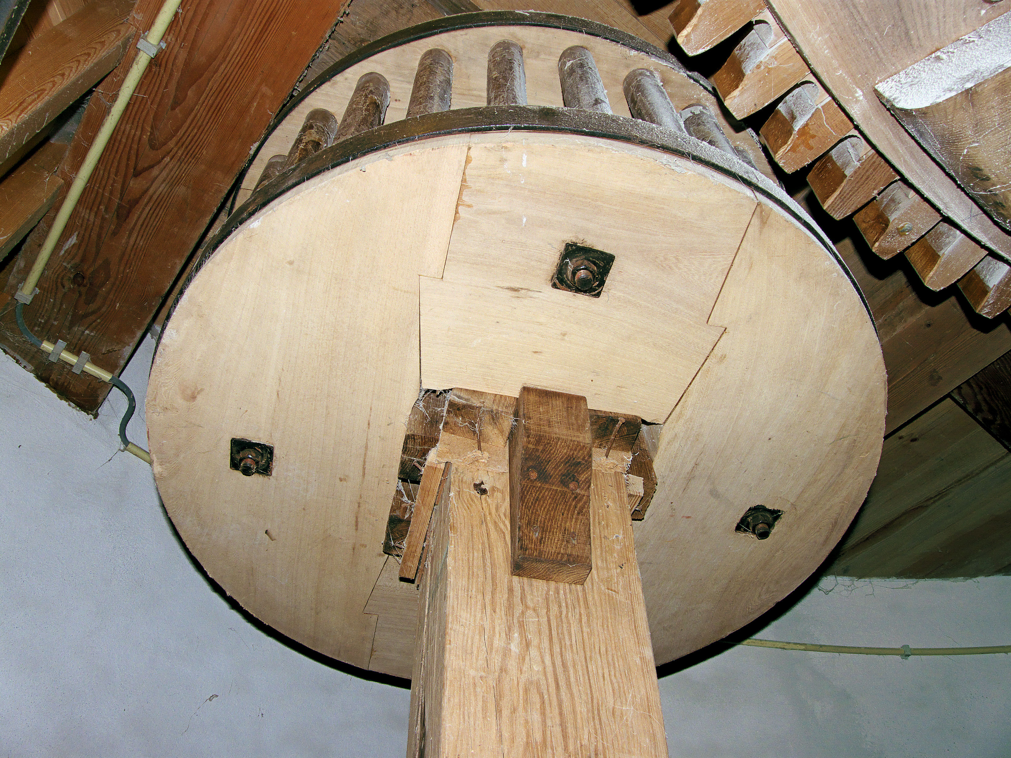 Molen Oog in 't Zeil Cothen, Nederland: steenrondsel bestaande uit twee maanstukken en twee kalven